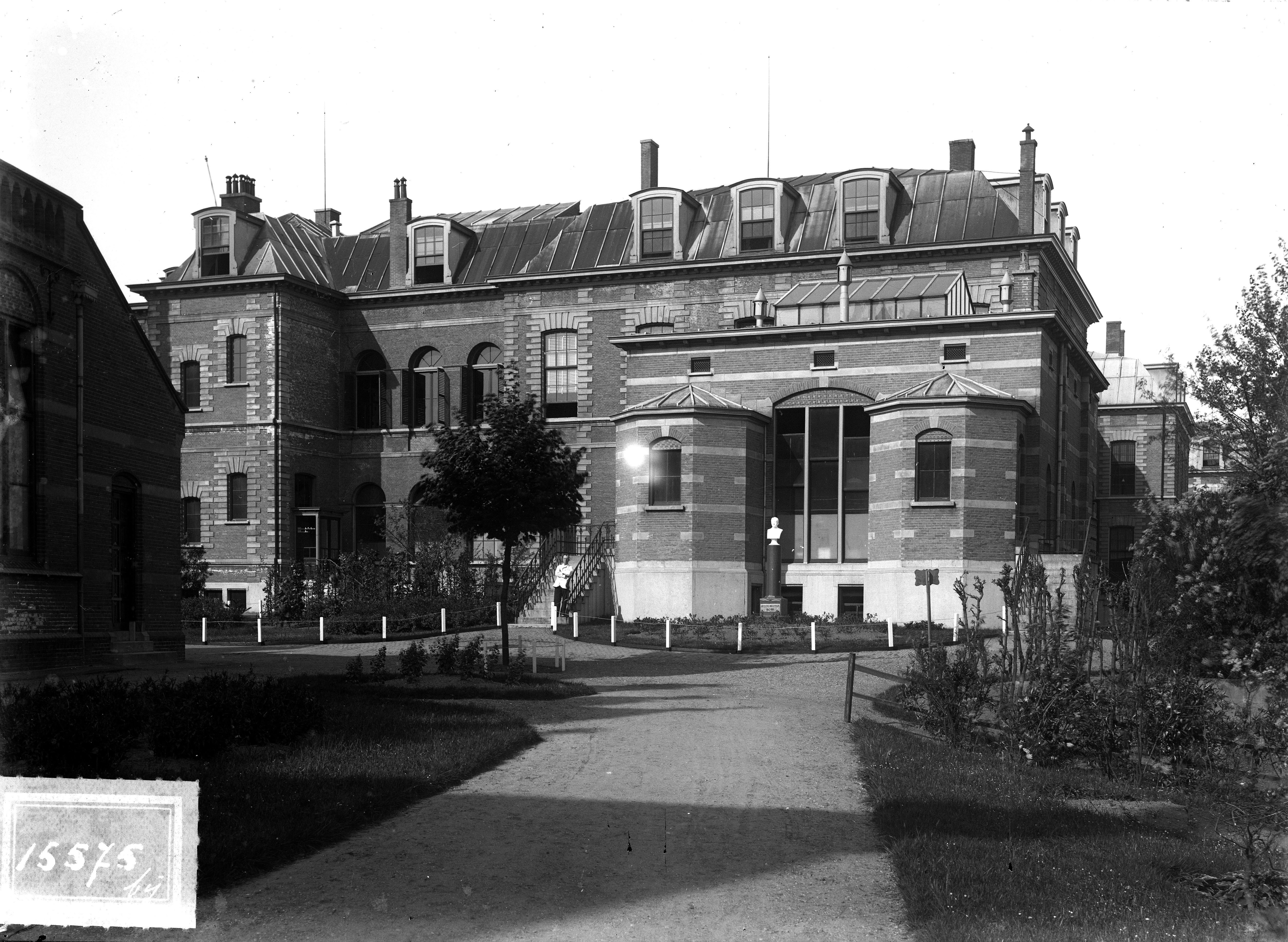 Vanaf de toegangspoort het voormalige Academische ziekenhuis aan de Steenstraat, thans Museum van Volkenkunde.